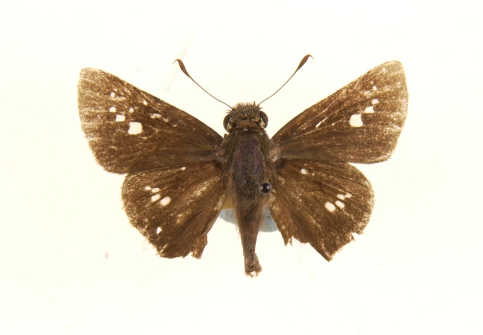 P discreta